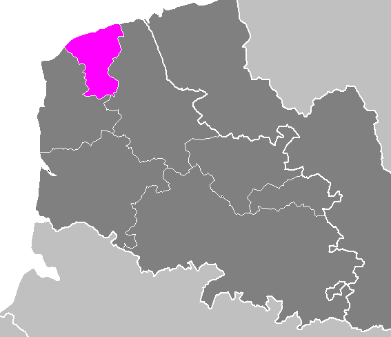 Arrondissement_de Calais